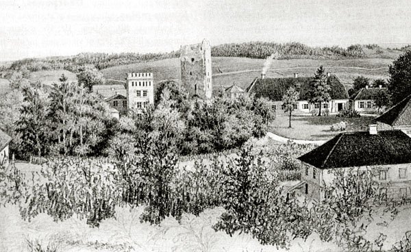 Vaade linnusetornile ja mõisale XIX sajandi postkaardil.